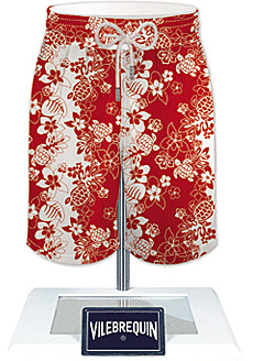 Bermuda da Vilebrequin